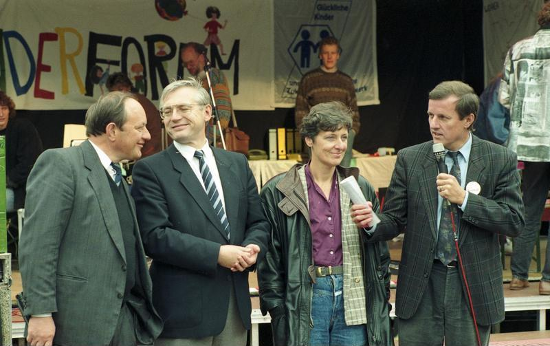 20.9.1990 Anläßlich des Weltkindertages veranstaltete das Deutsche Kinderhilfswerk ein großes Spiel-Fest auf dem Bonner Münsterplatz